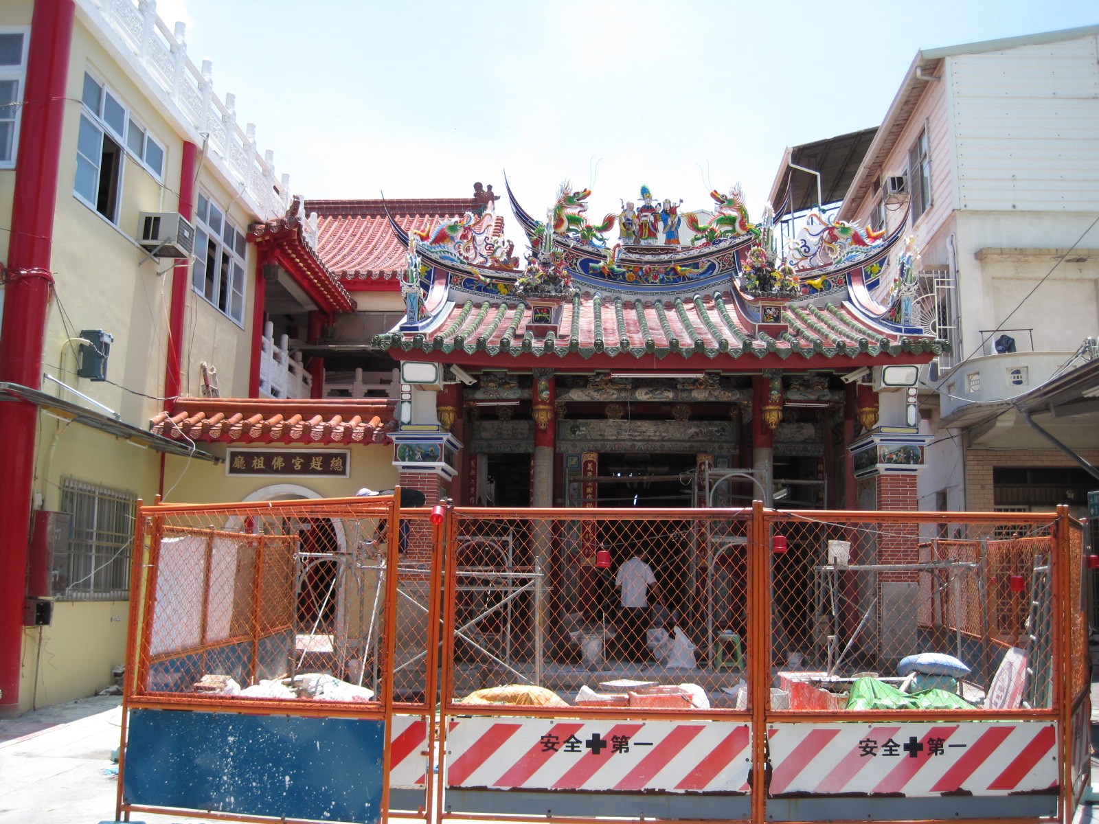 整修時的臺南總趕宮